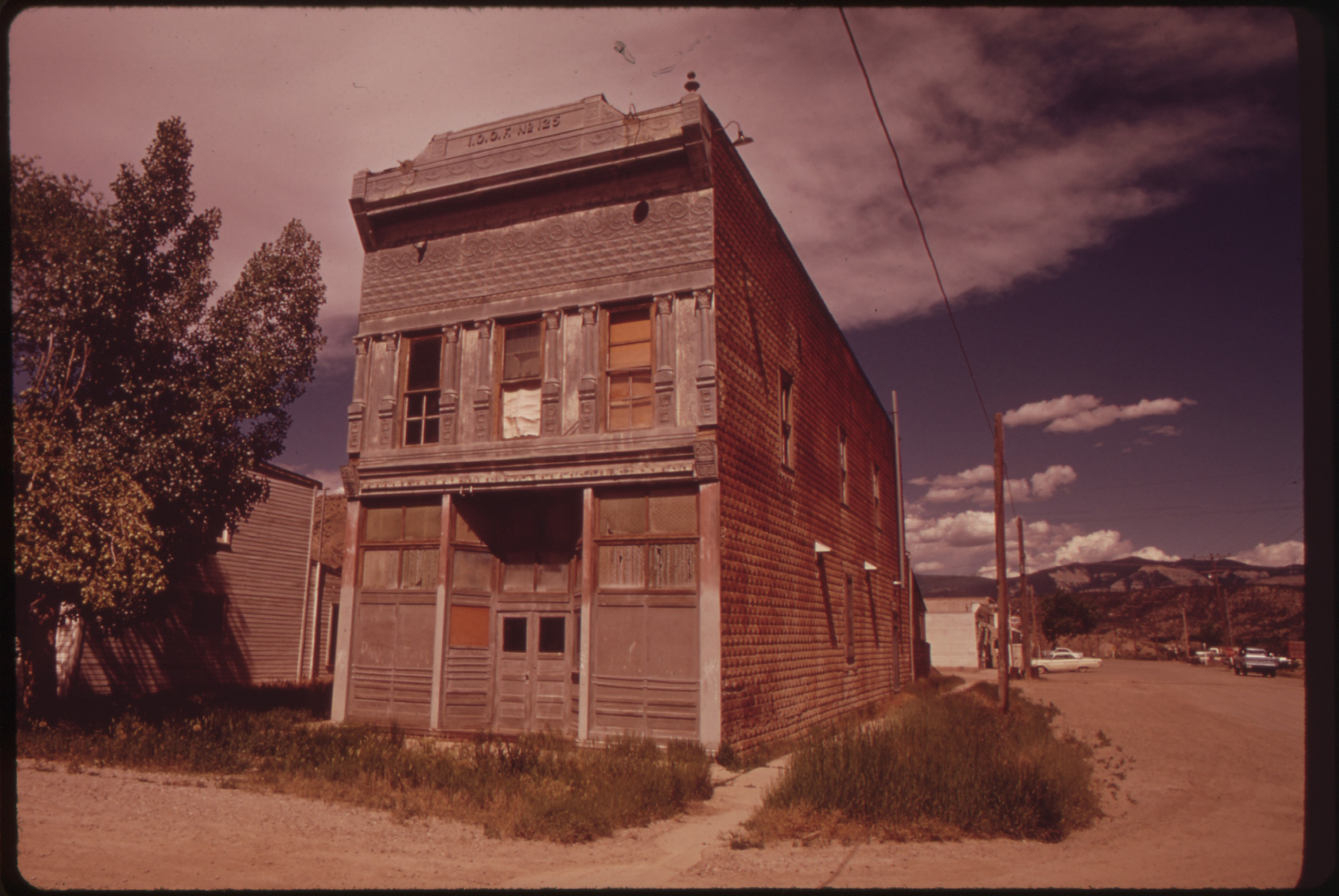 General notes: De Beque, Colorado — in 1973.